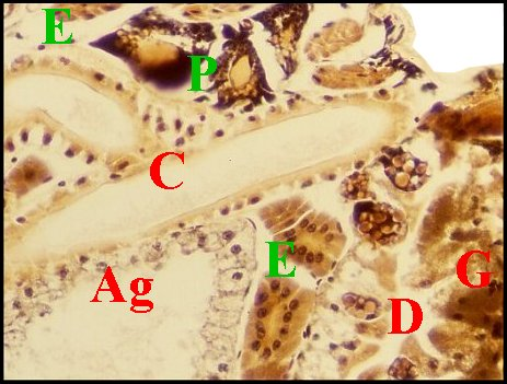 Emplacement du tissu endocrinoïde dans une vue d'ensemble d'abdomen de Mastophora femelle immature